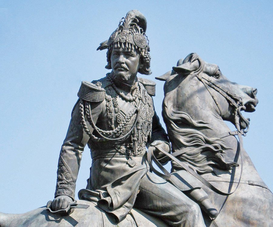 नेपाली: Jangabahadur Horse Riding Statue at Tundikhel